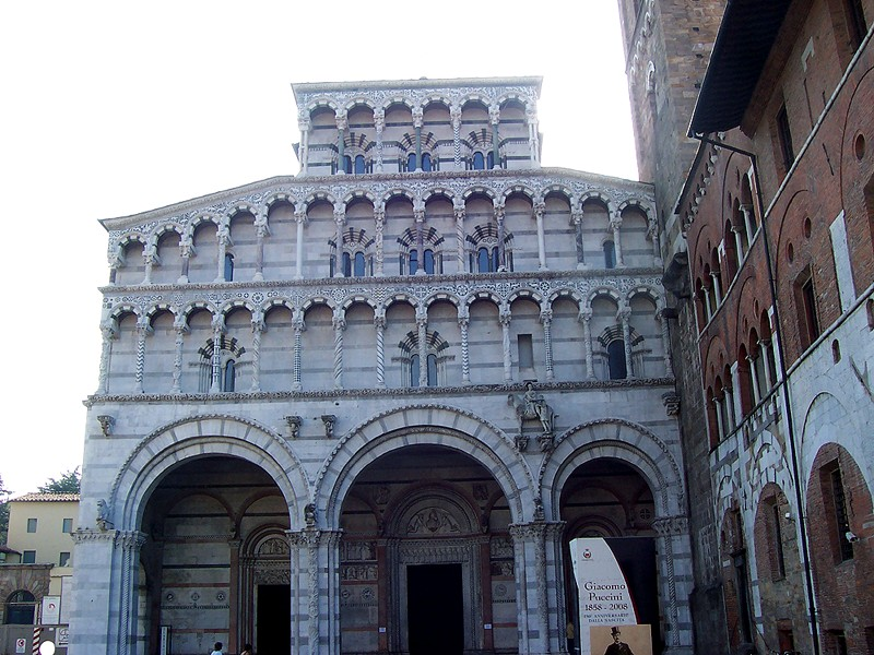 Lucca - Duomo